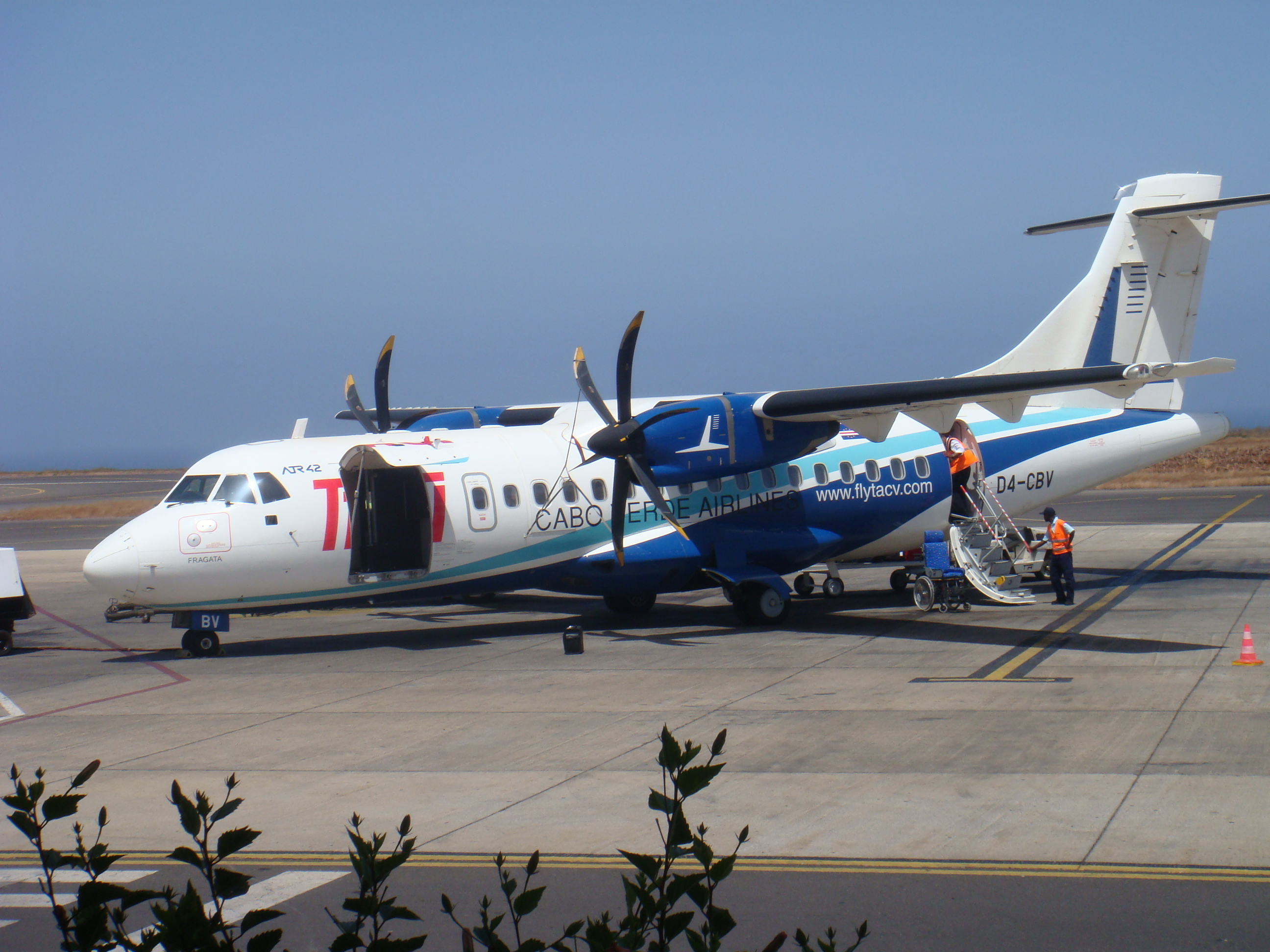 Un ATR de la compagnie nationale cap-verdienne, la TACV. Les 3 ATR de la compagnie assurent les liaisons intérieures et avec le Sénégal.